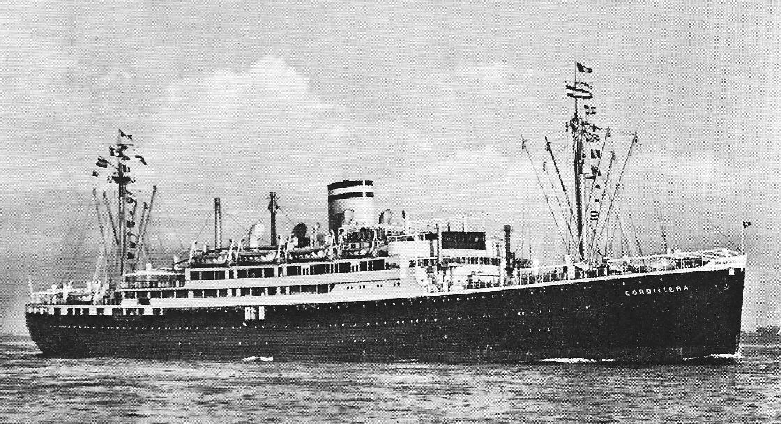 Der Passagierdampfer Cordillera der Hapag